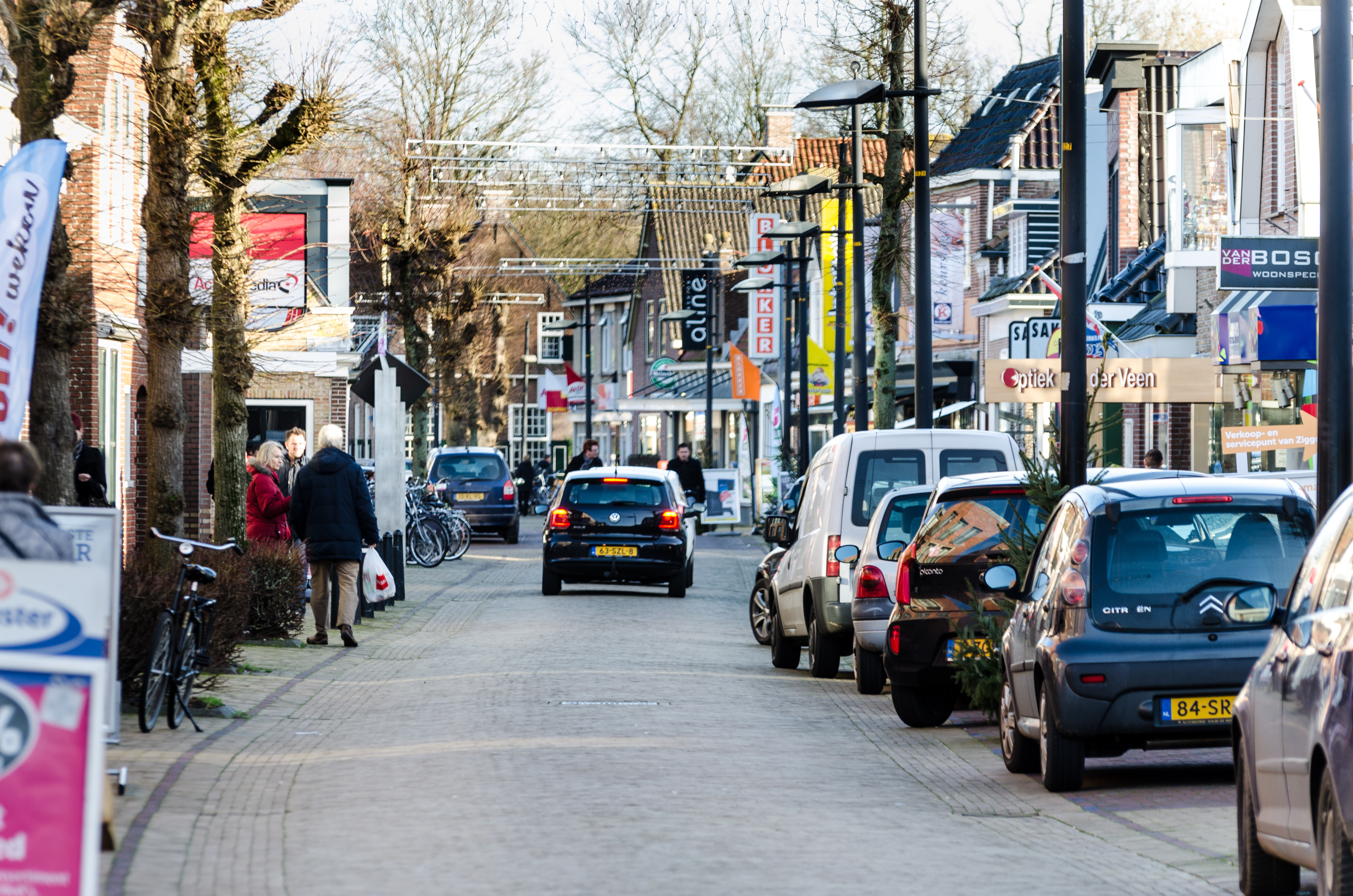 De Skoallestrjitte (Schoolstraat) in Burgum.